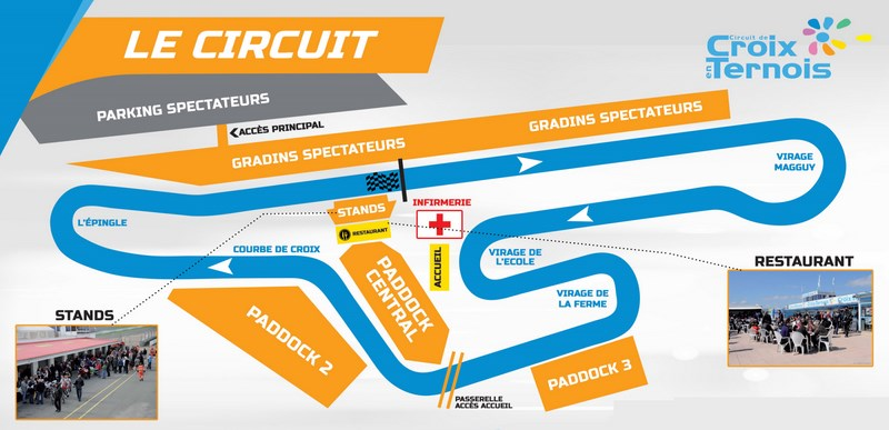 Plan du circuit de croix en ternois et autres installation